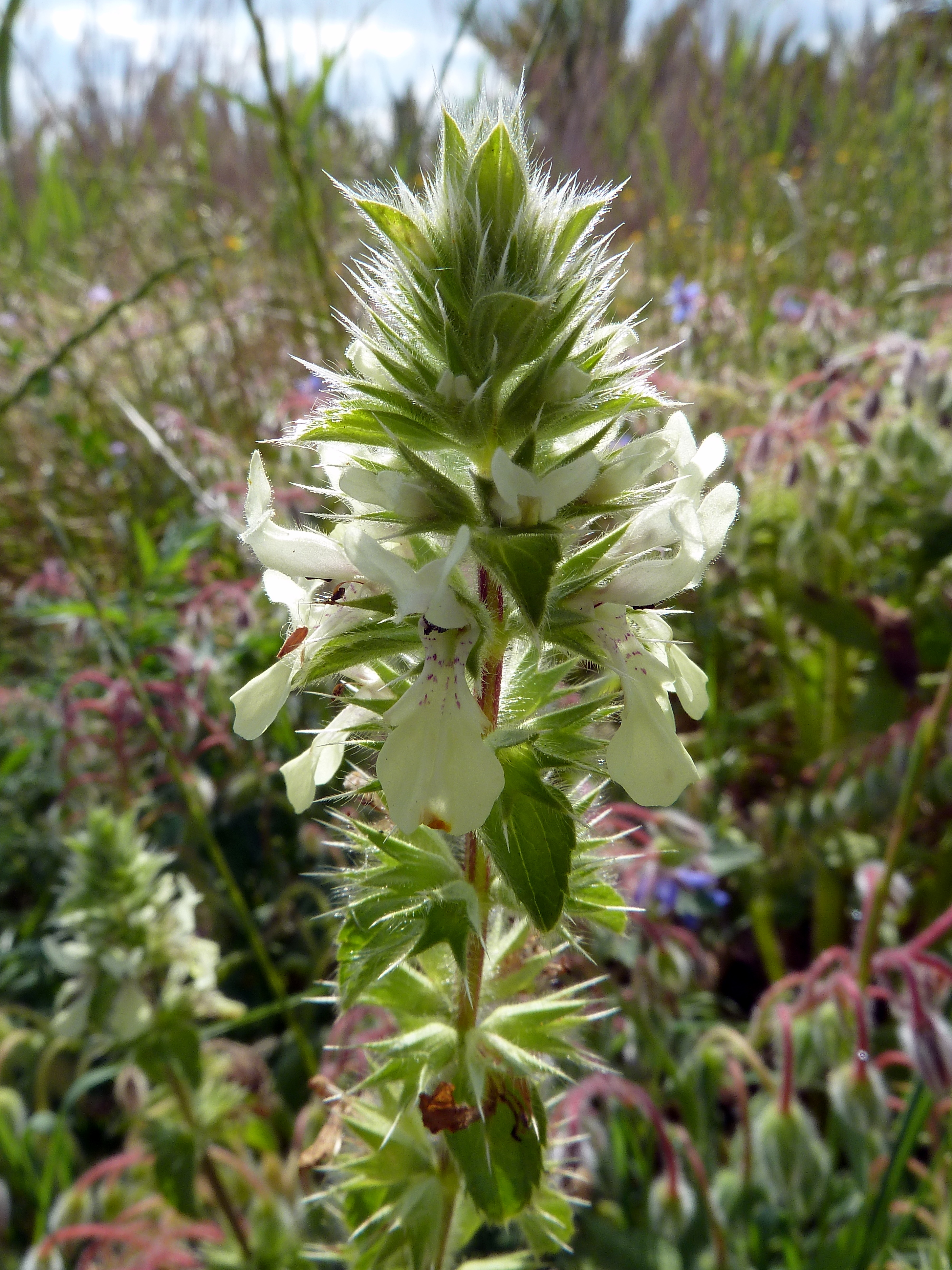 Stachys ocymastrum (Rabo de zorra) : Inflorescencia - Camino de la Azarbe de Patricio, Albatera (Provincia de Alicante, España).